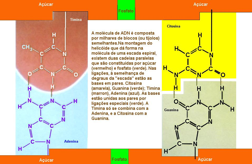 Blocos ADN. By Angeloleithold 1979